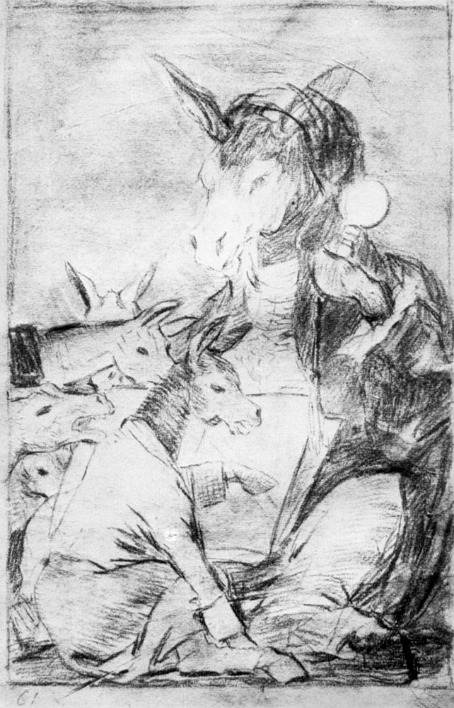 Dibujo preparatorio del capricho nª 37.